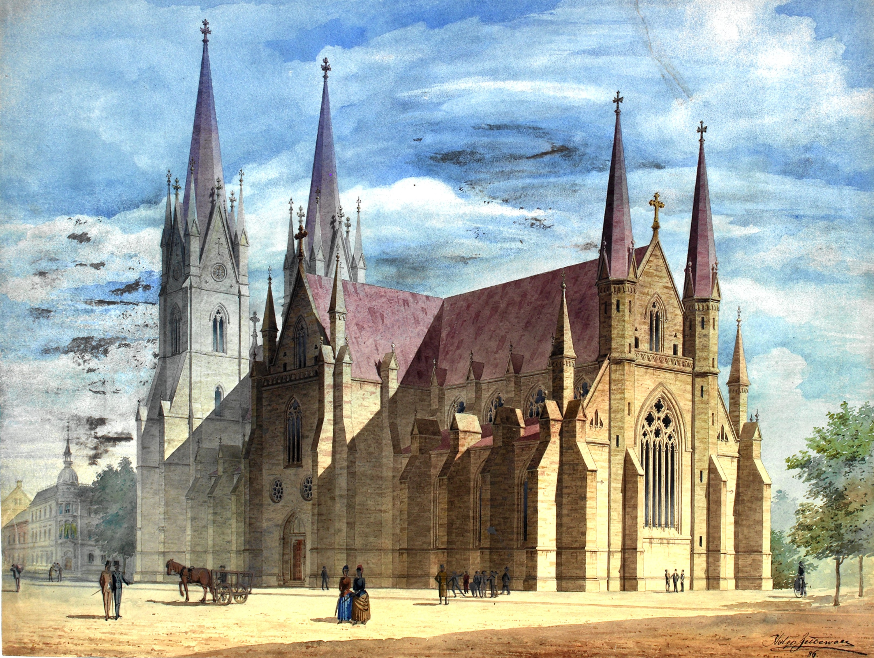 Skara domkyrka. Illustration av restaurering.